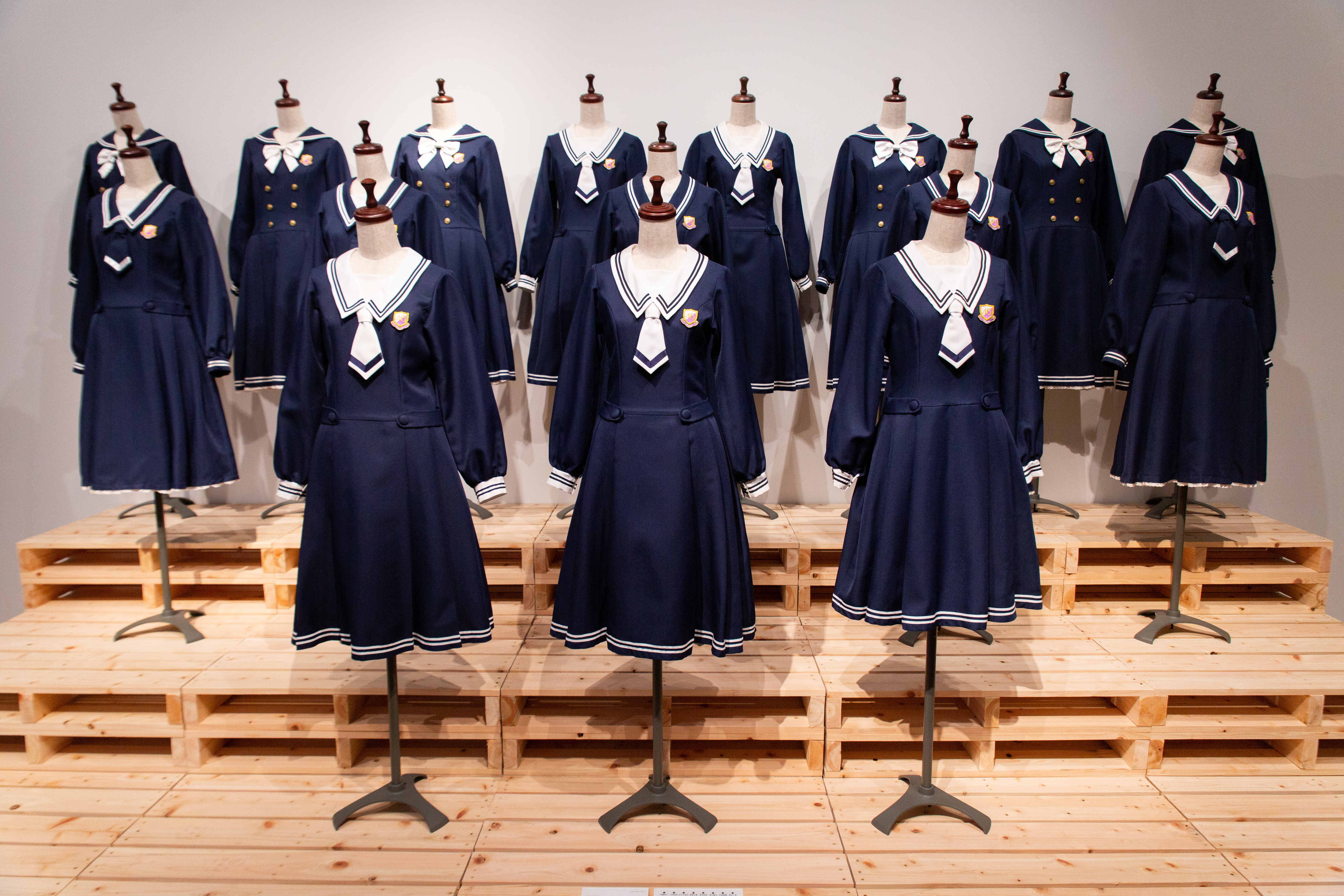 乃木坂46 Artworks だいたいぜんぶ展 衣装 君の名は希望